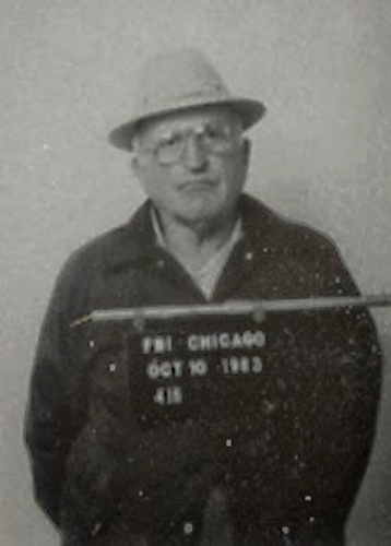 Joseph Aiuppa (Im Alter von 79)